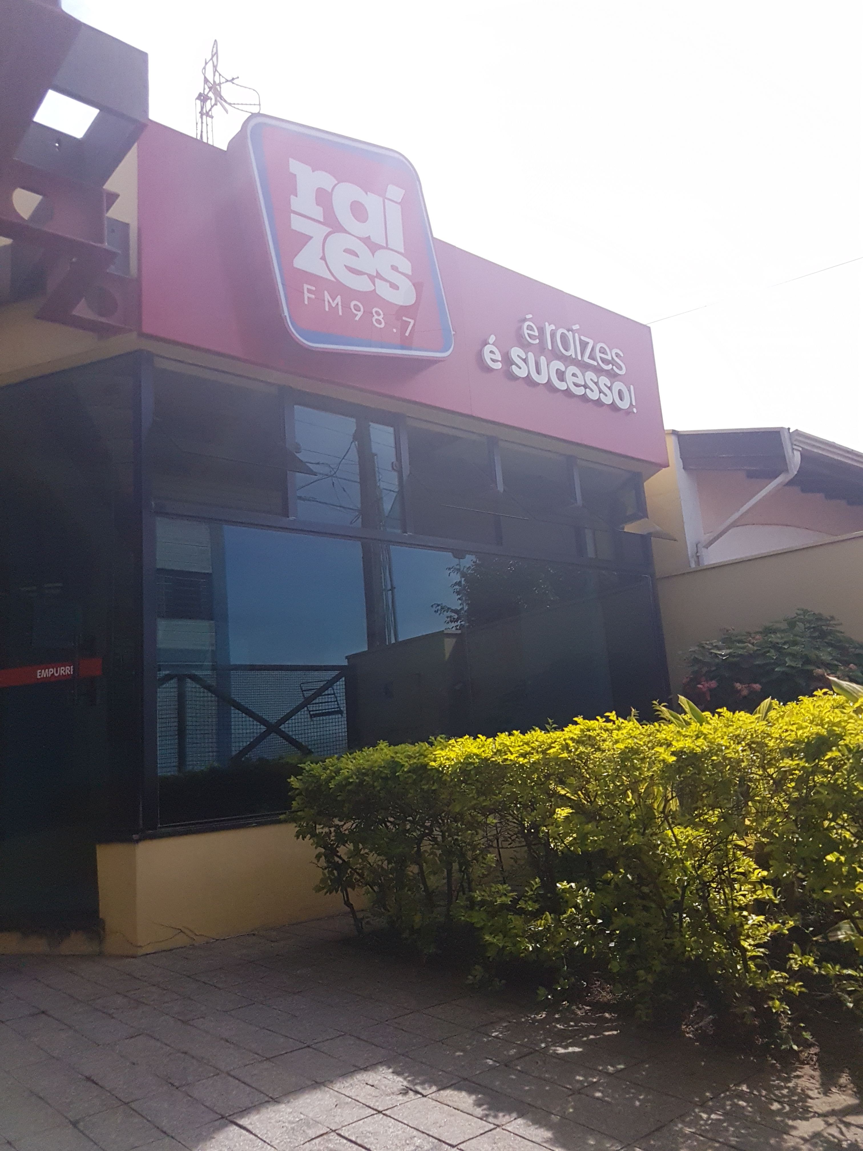 Sede da rádio Raízes FM em Capivari, SP.